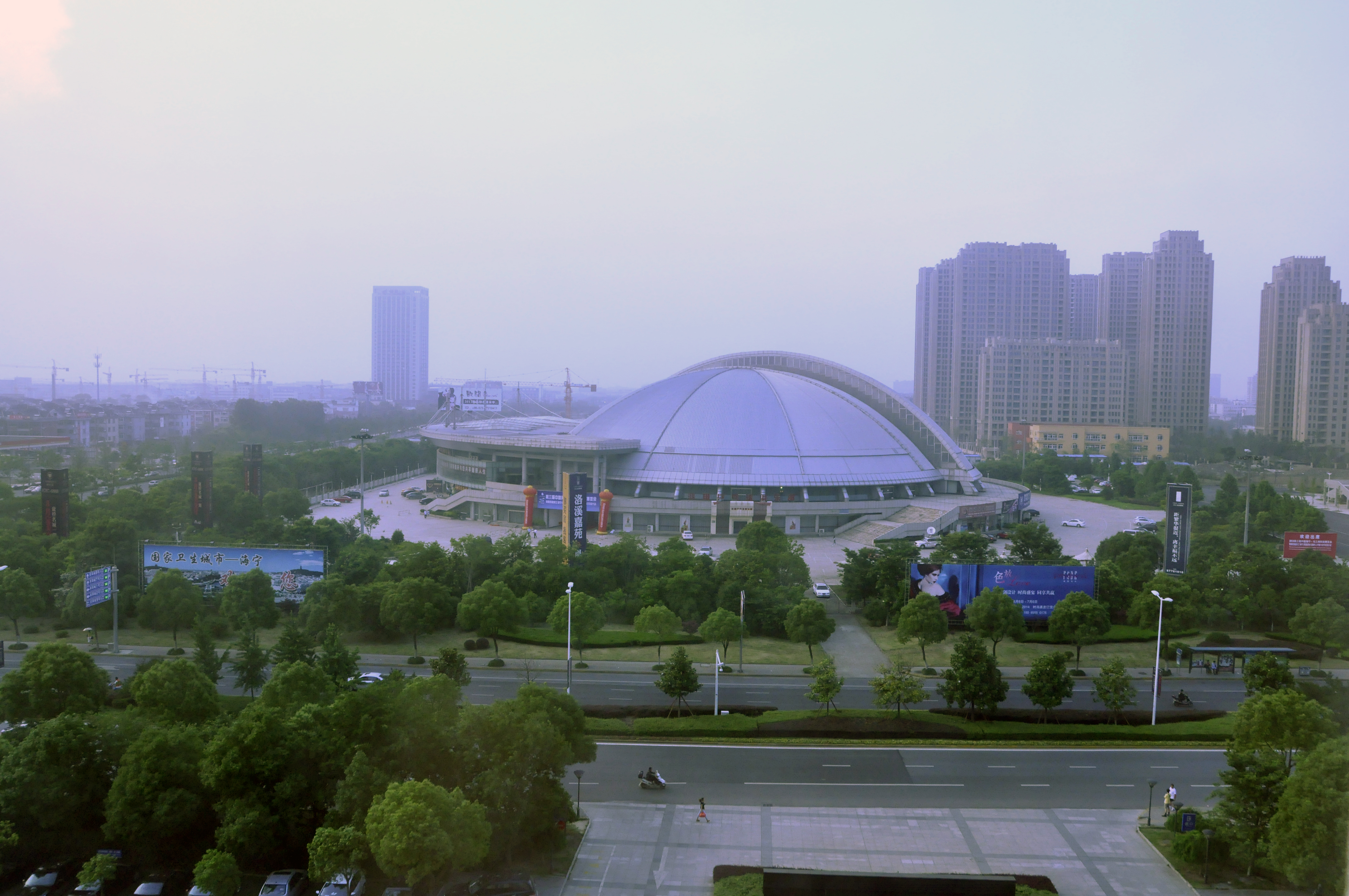 Haining Indoor Stadium 海宁市体育馆